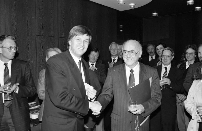 Bonn, 4.3.1991 Der Parlamentarische Staatssekretär beim Bundesminister für Frauen und Jugend, Peter Hintze, verabschiedete den Vorsitzenden der Bundesprüfstelle für jugendgefährdende Schriften, Rudolf Stefen, während einer Feierstunde im Presseclub